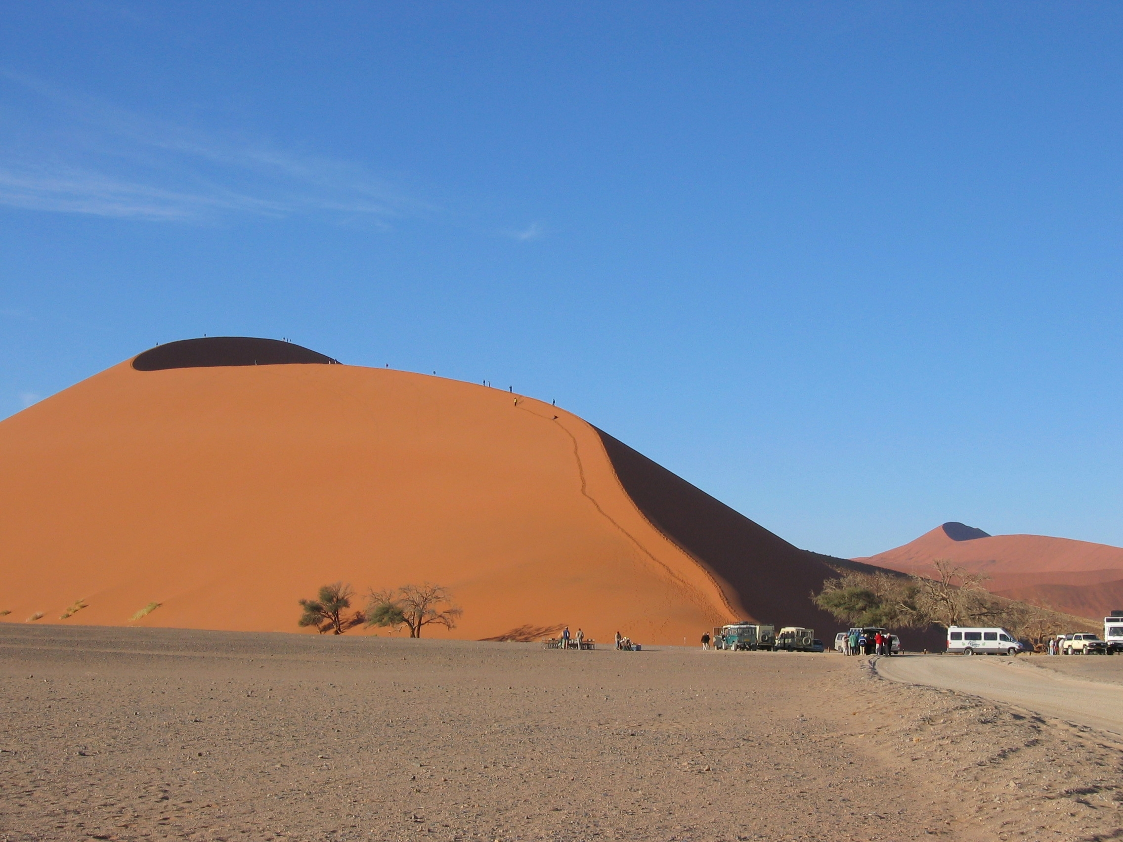 Dune 45, Sossusvlei, Namibia